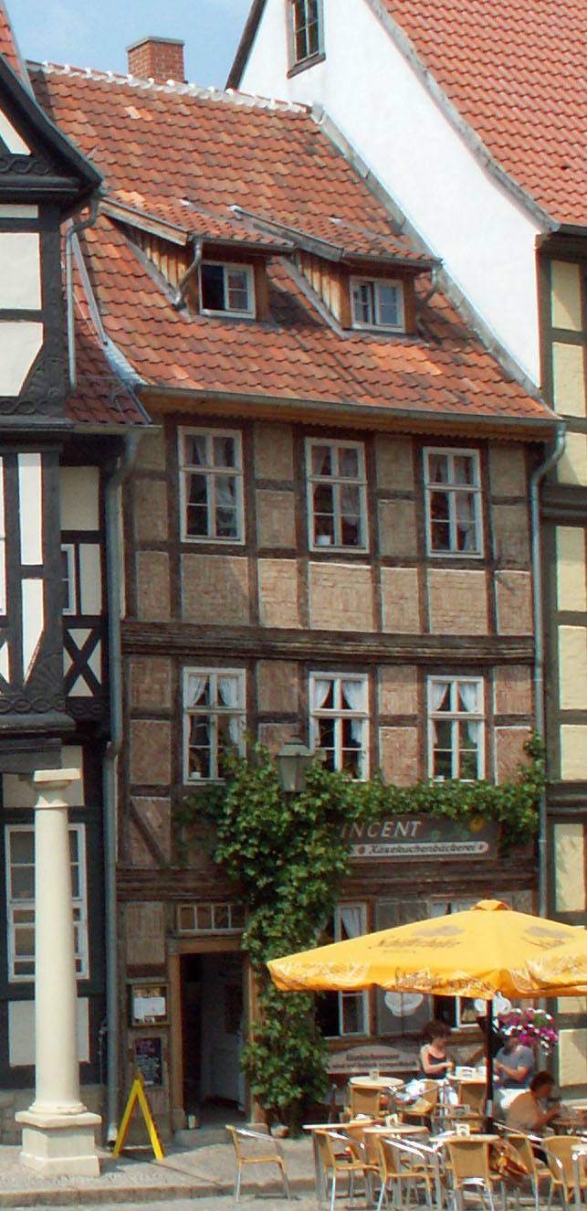 Aufgenommen auf einem Stadtrundgang durch die UNESCO Kulturerbestadt Quedlinburg.